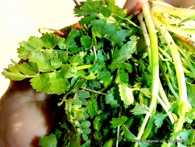 نباتات برّية سورية تؤكل